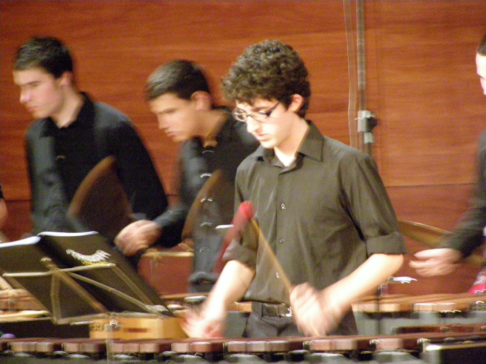 Pablo Sánchez a la marimba en el concierto de Percujove en la Concejalía de Juventud de Valencia, junio 2007